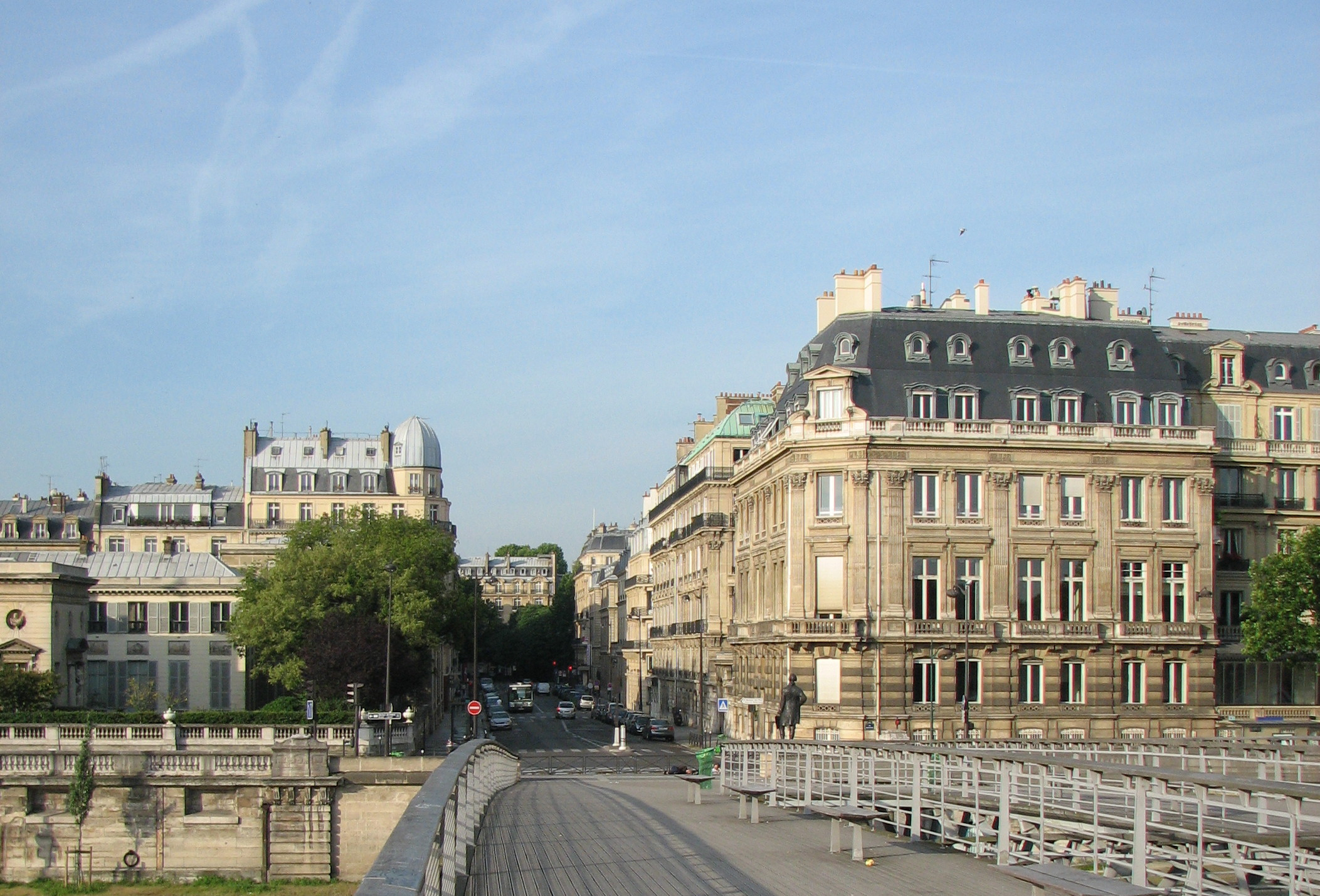 Vue de la rue de Solférino à Paris, depuis la passerelle Léopold-Sédar-Senghor.